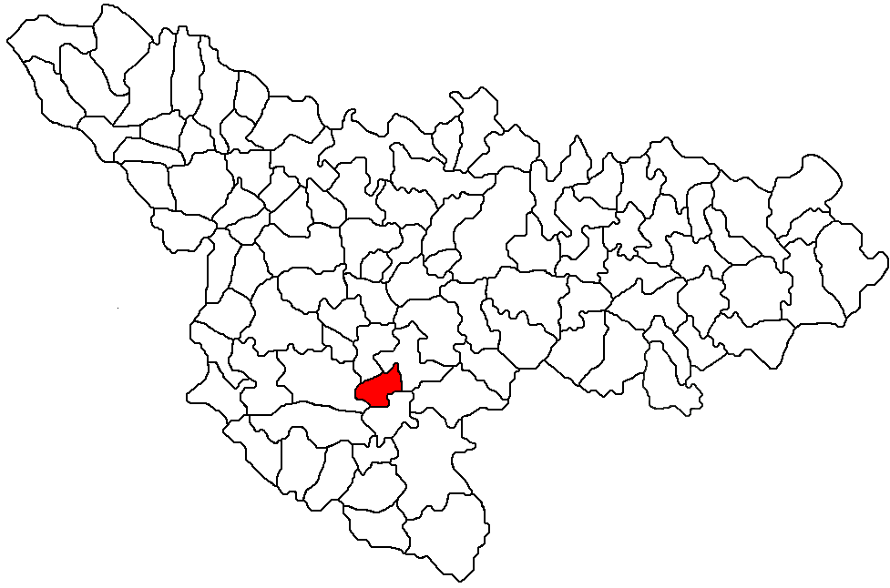 Categorie:Hărţi ale judeţului Timiş